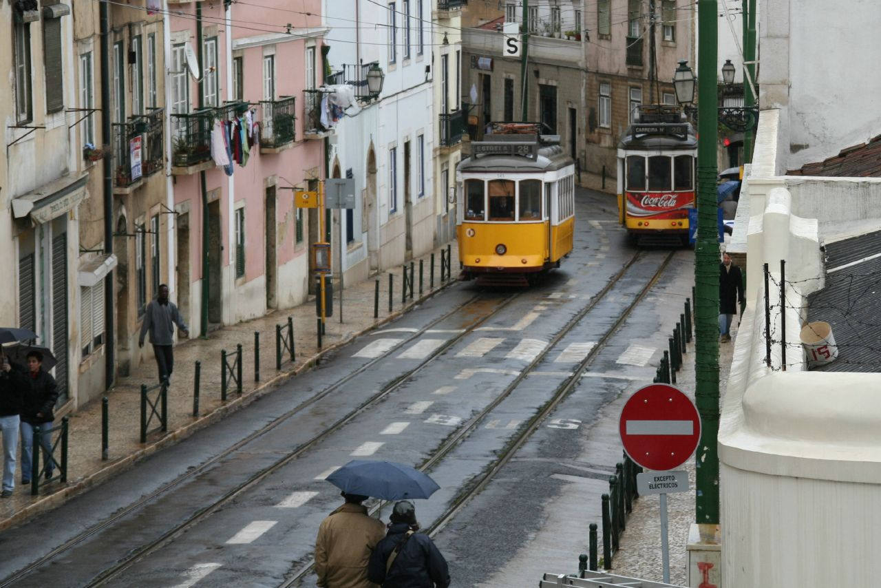 Lisboa: tranvías